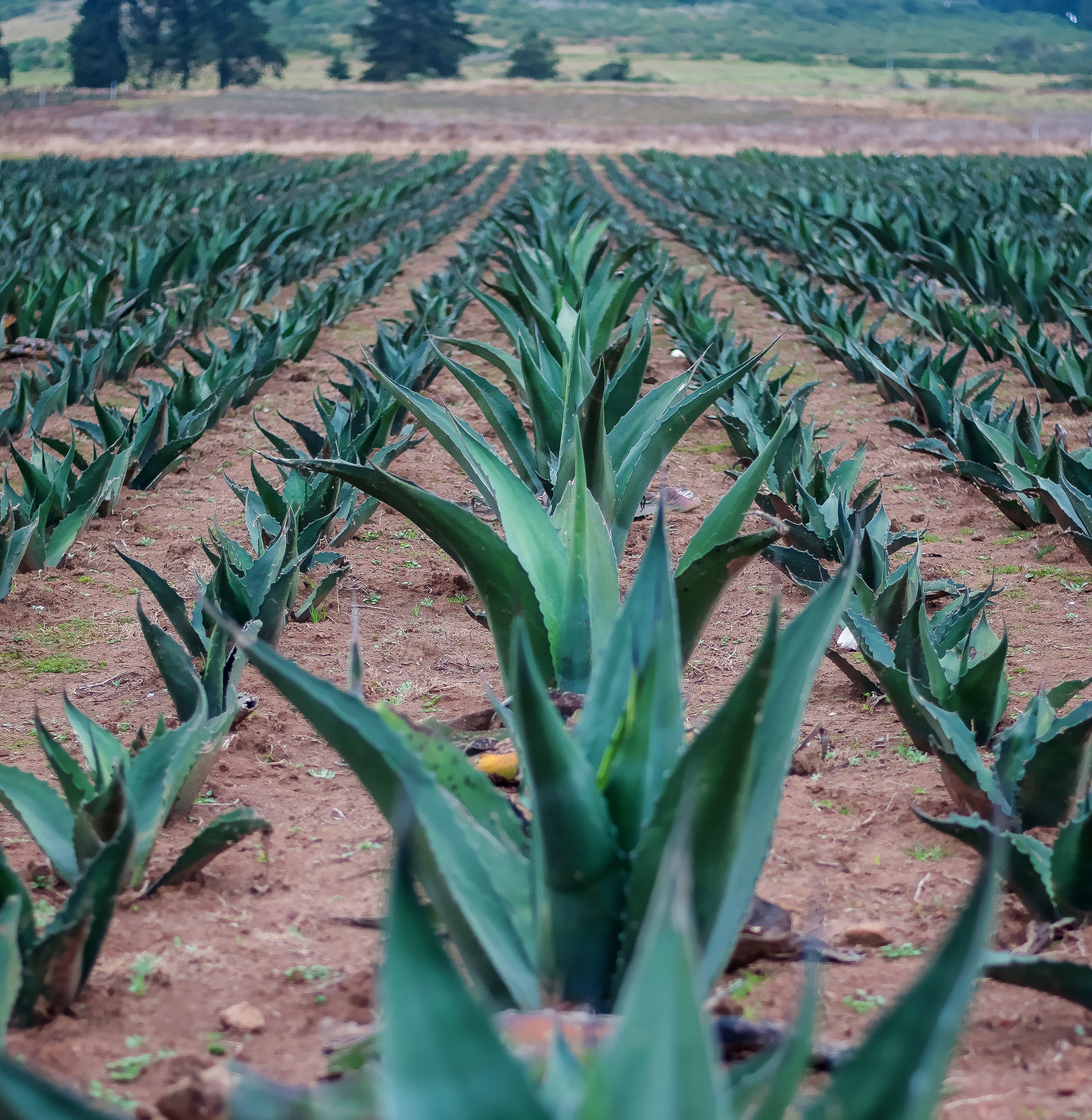 Campos de sembradío de maguey, hacienda de Amoltotepec Puebla